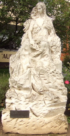 Loreley - Skulptur von Mariano Pinton (1979) Standort: Loreley Aufnahme: September 2007 Url